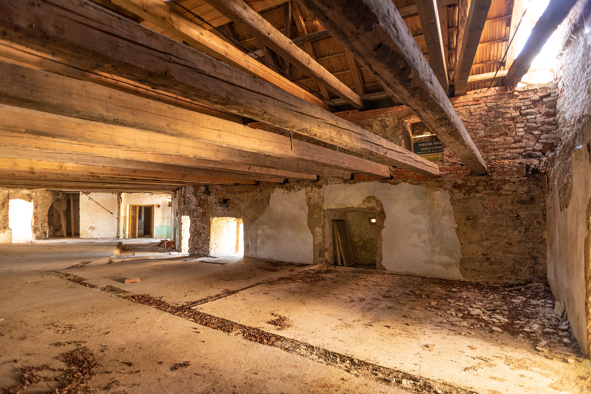 Zámek Rožmitál pod Třemšínem, bývalá sýpka